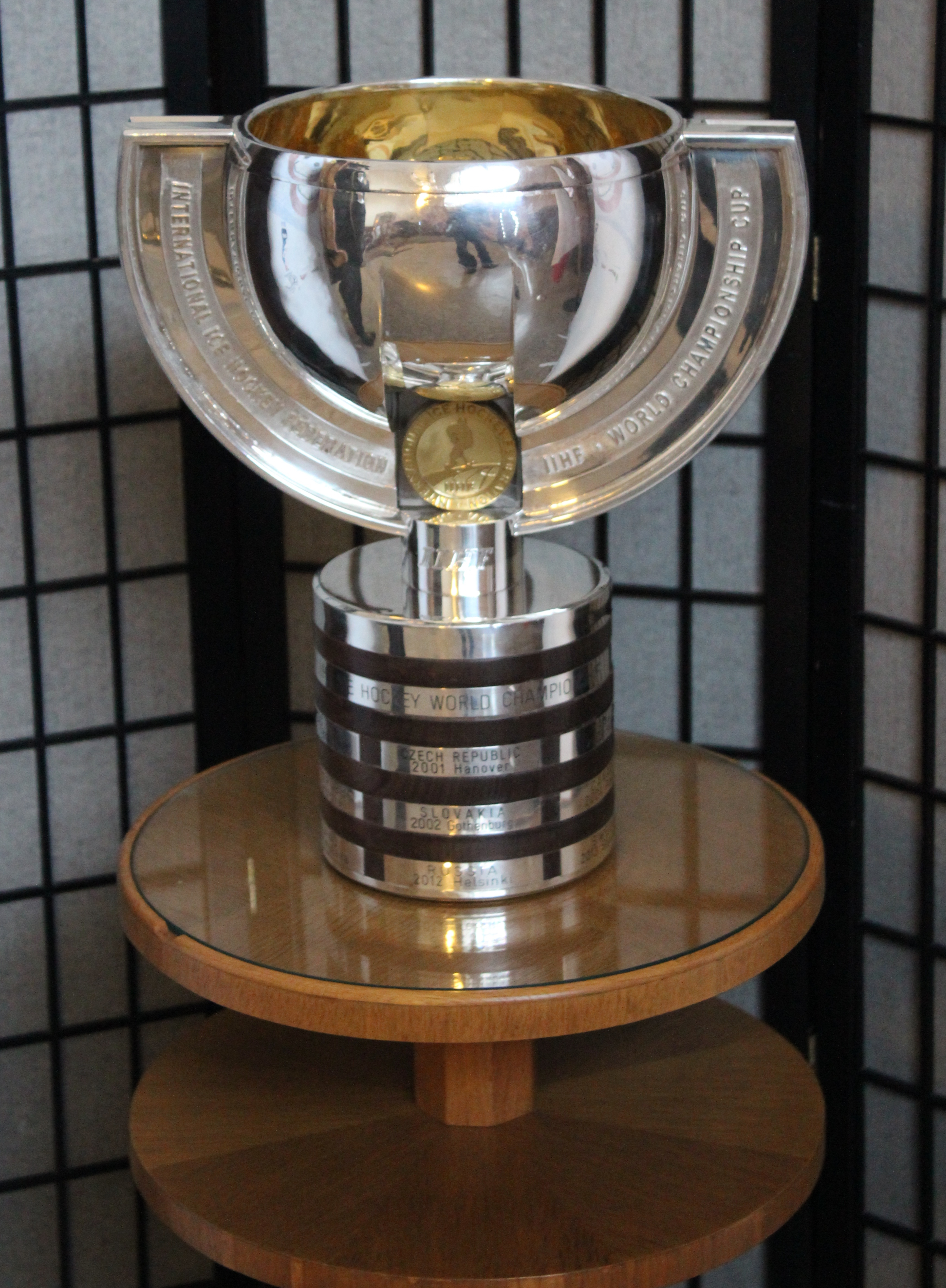 Pohár pro mistra světa IIHF v ledním hokeji vystavený ve vstupu do budovy pražského magistrátu (Nové radnice) na Mariánském náměstí.